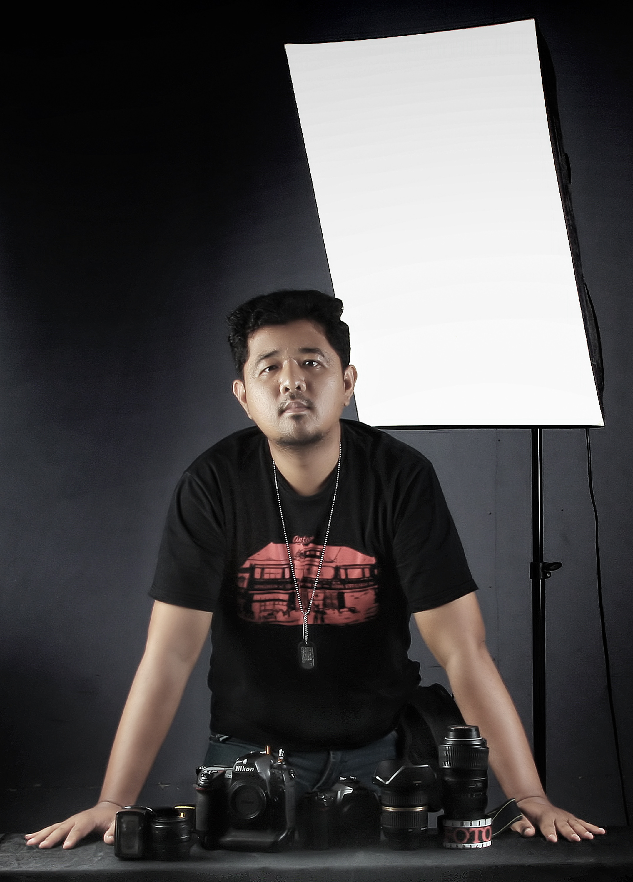 Iggoy el Fitra